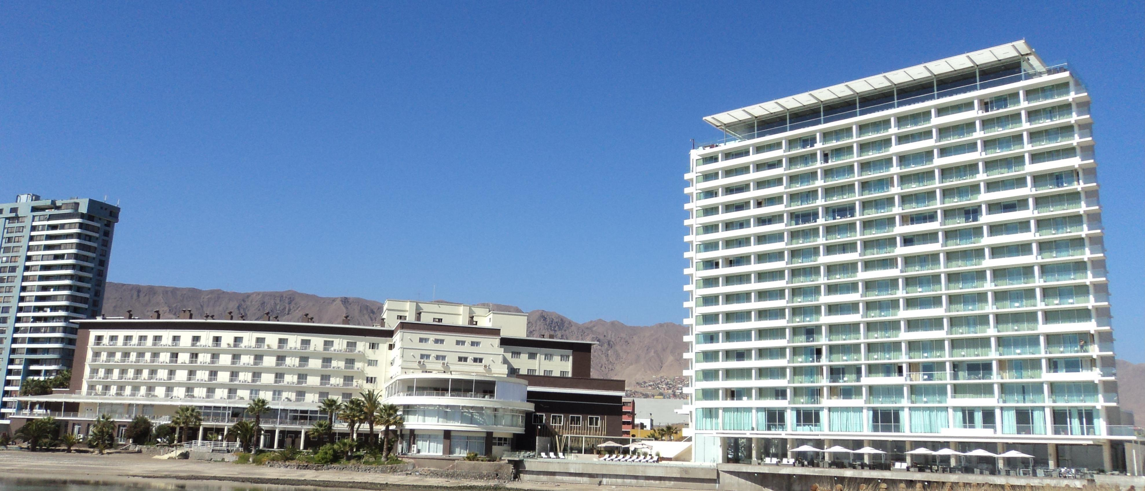 Vista posterior del Hotel Antofagasta, y el Hotel Terrado, Antofagasta, Chile.